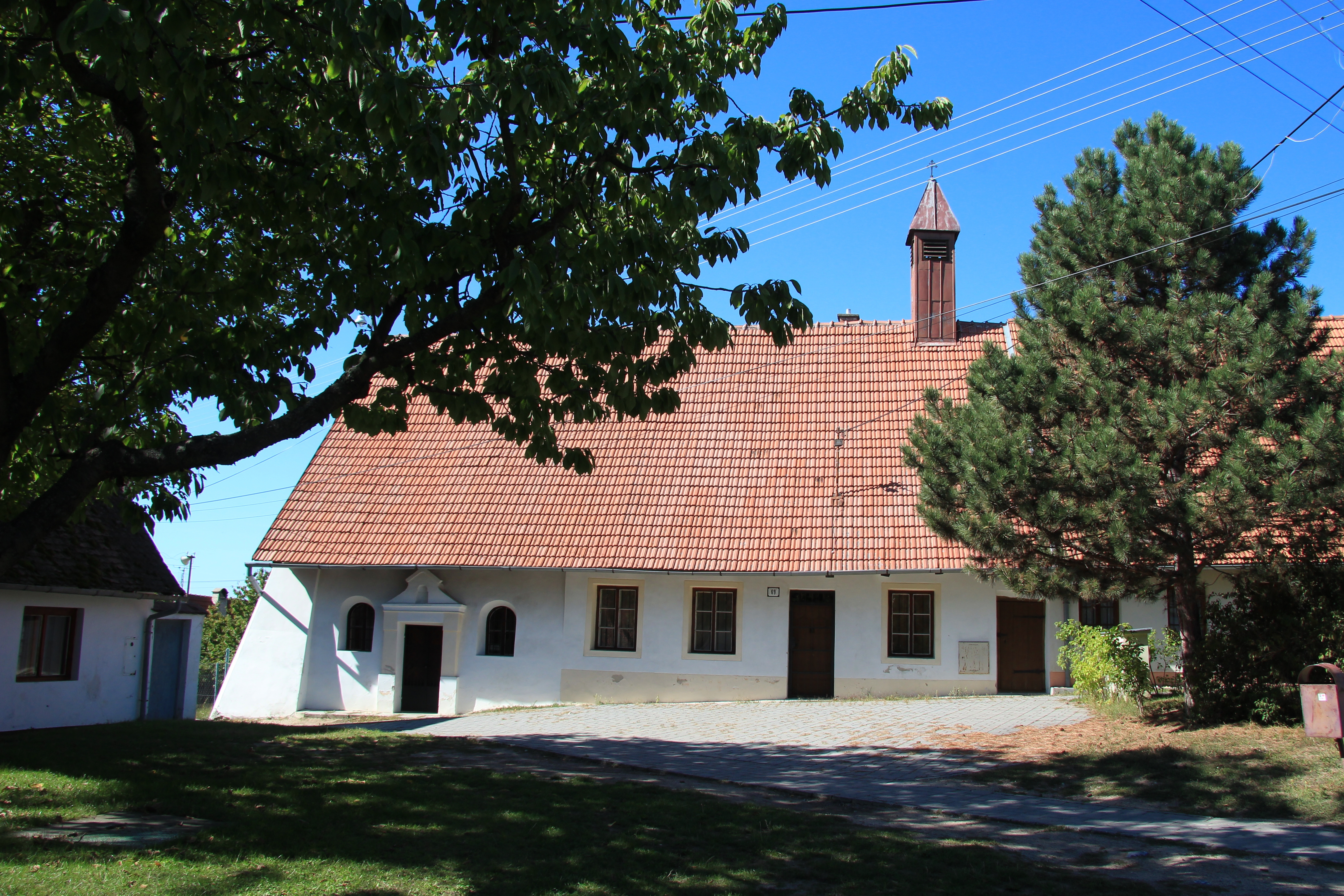 Habaner Kapelle in Veľké Leváre Hausnr.69